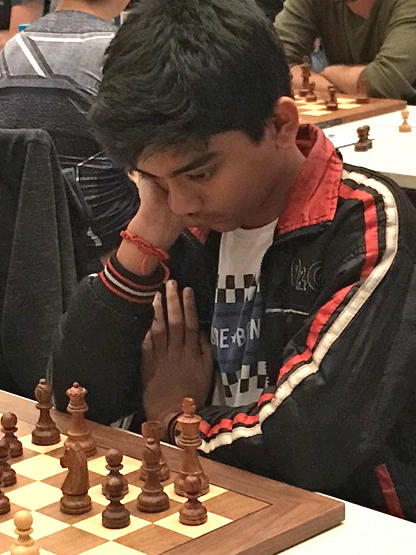 Gukesh D, Runde 9 der Grenke Chess Open 2019 in Karlsruhe.